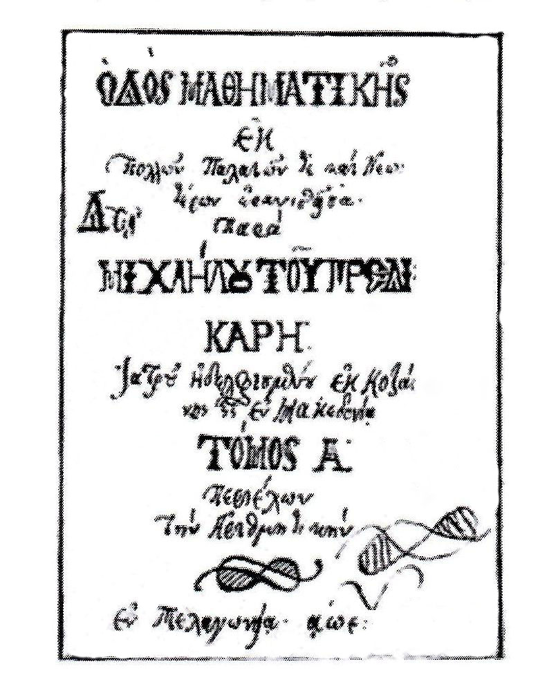 Η σελίδα τίτλου χειρογράφου του 1805. «Ὁδός Μαθηματικῆς ἐκ πολλῶν Παλαιῶν τέ καί Νεωτέρων ἐρανισθεῖσα παρά Μιχαήλου τοῦ Πρεδικάρη». Εν Πελαγωνία, 1805.